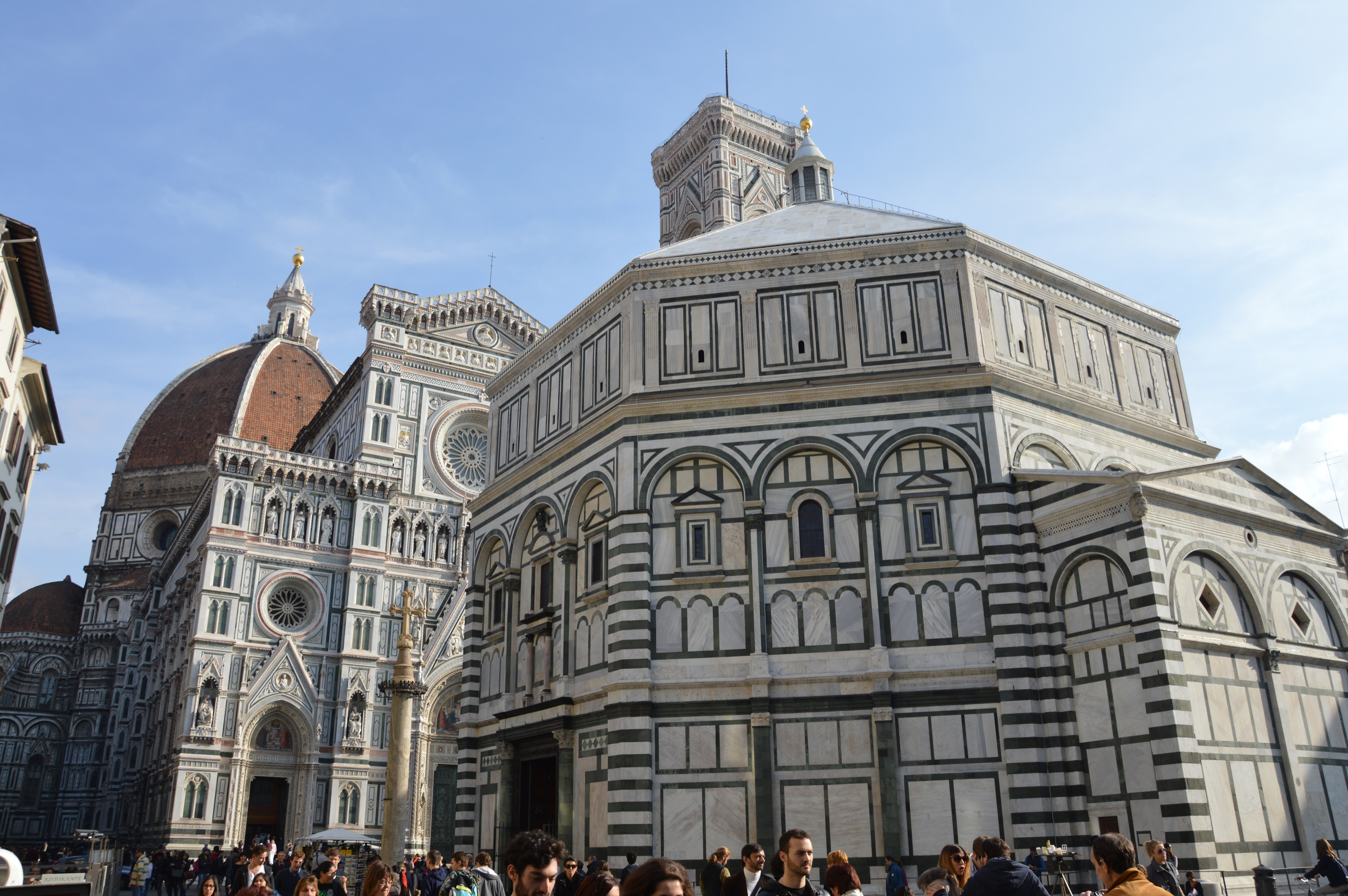 Duomo e Battistero di Firenze